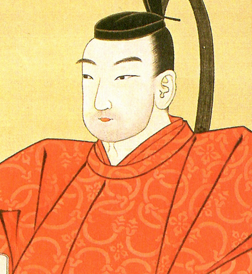 遠山友清の肖像。